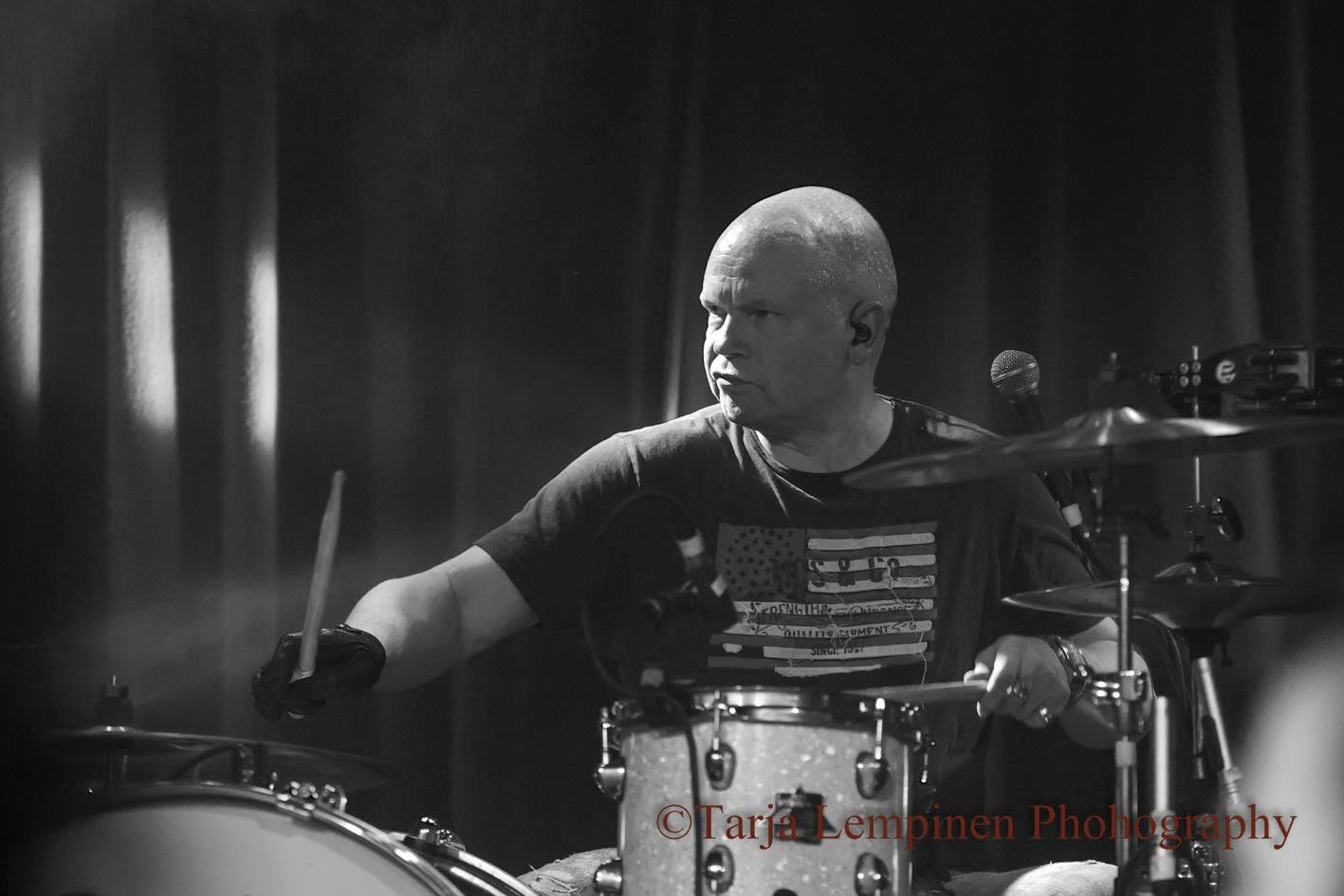 Kuva, Tarja Lempinen. Yo Talo Tampere